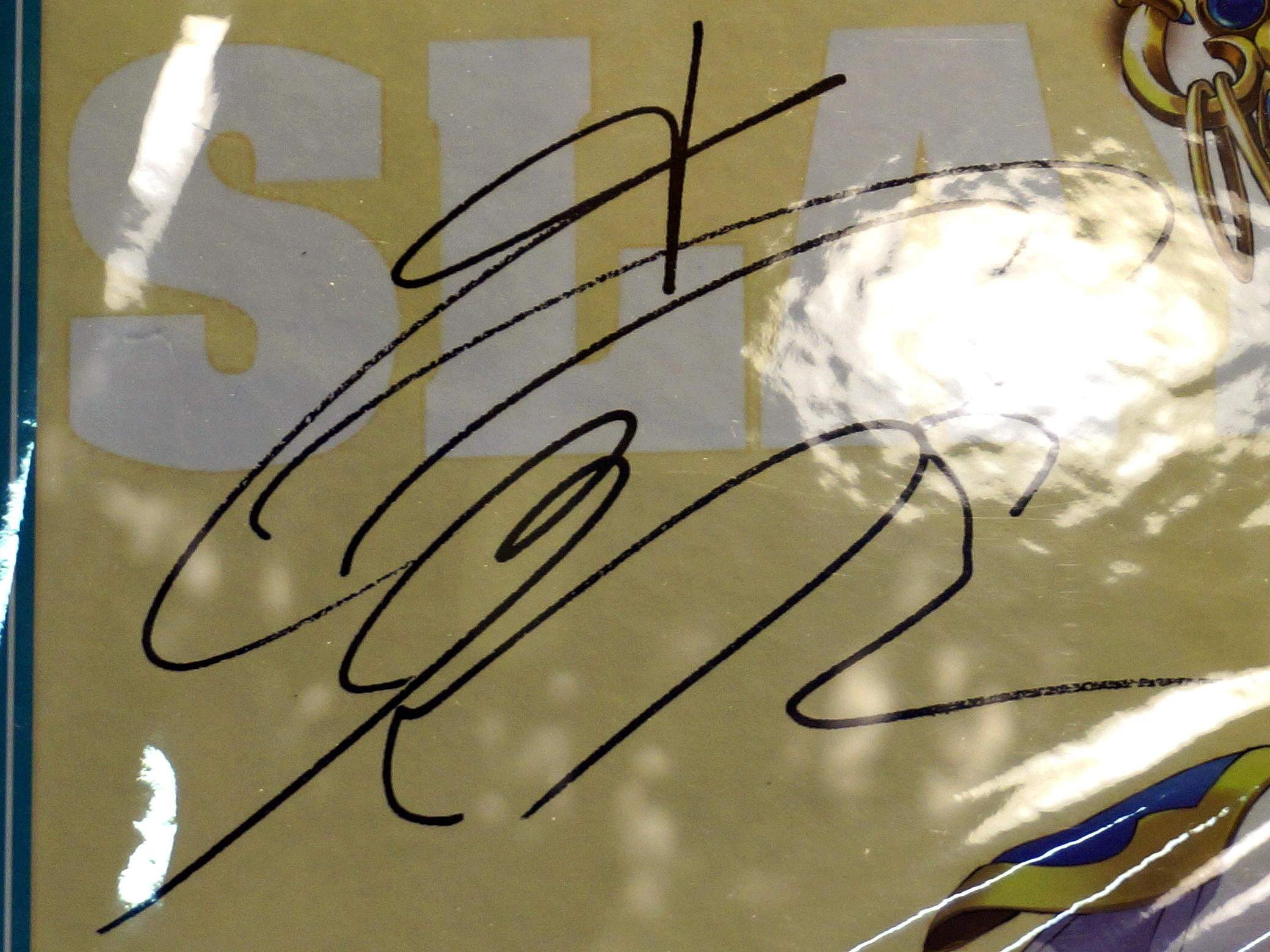 中文（台灣）: 第20屆漫畫博覽會，「漫畫博覽會歷屆名師簽繪手稿展」展示的小倉唯簽名。